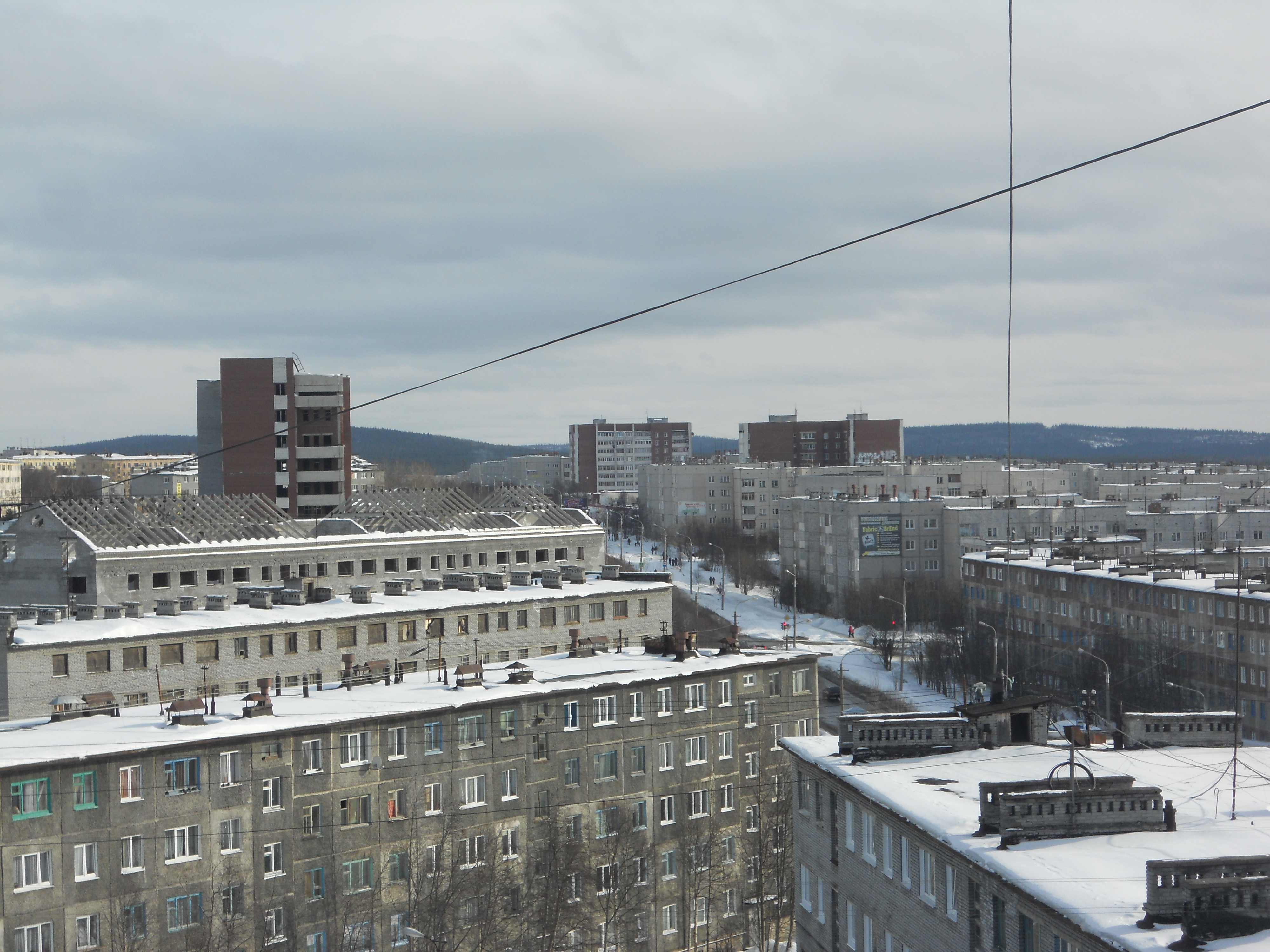 Улица Бредова